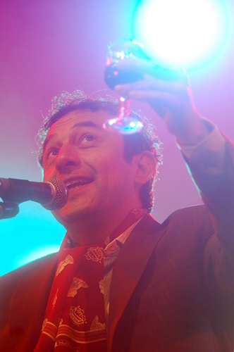 Daniel Muñoz Brantes (nacido en San Fernando, el 11 de febrero de 1966) es un actor y cantante de cuecas chileno. Nació en San Fernando y estudió en la escuela de teatro de la Universidad de Chile.